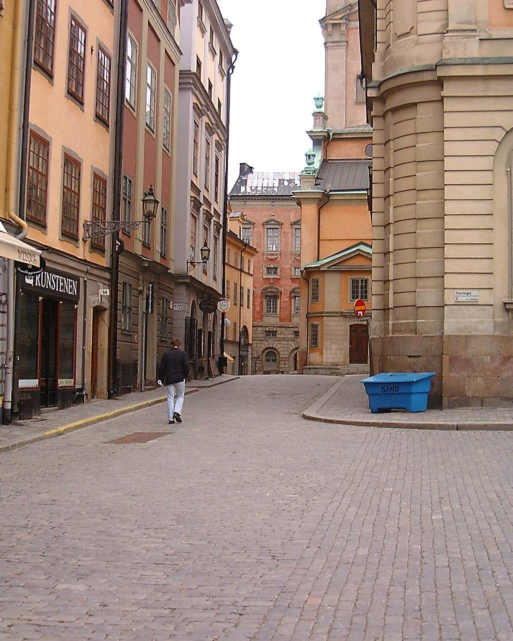 Trångsund viewed from Stortorget in Gamla stan, Stockholm.